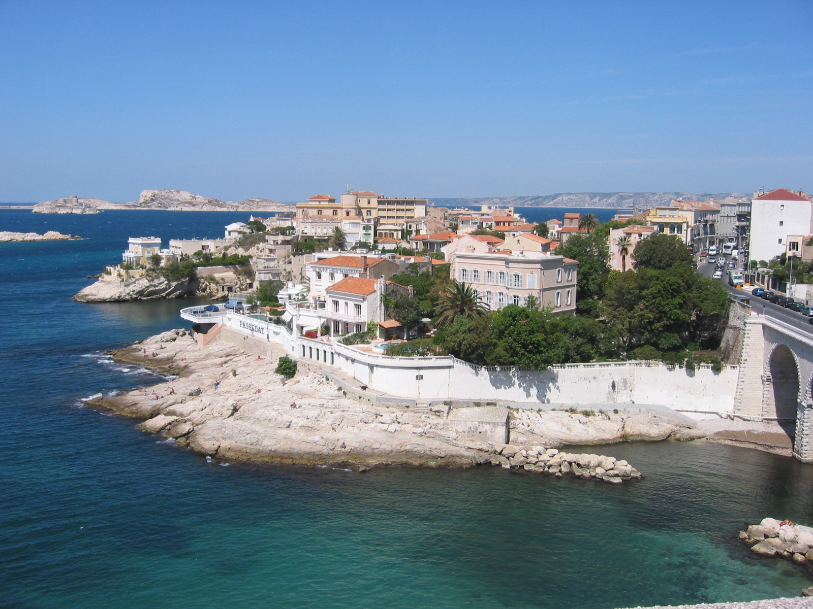 La Corniche du Président John Fitzgerald Kennedy et Malmousque dans le quartier d'Endoume à Marseille.